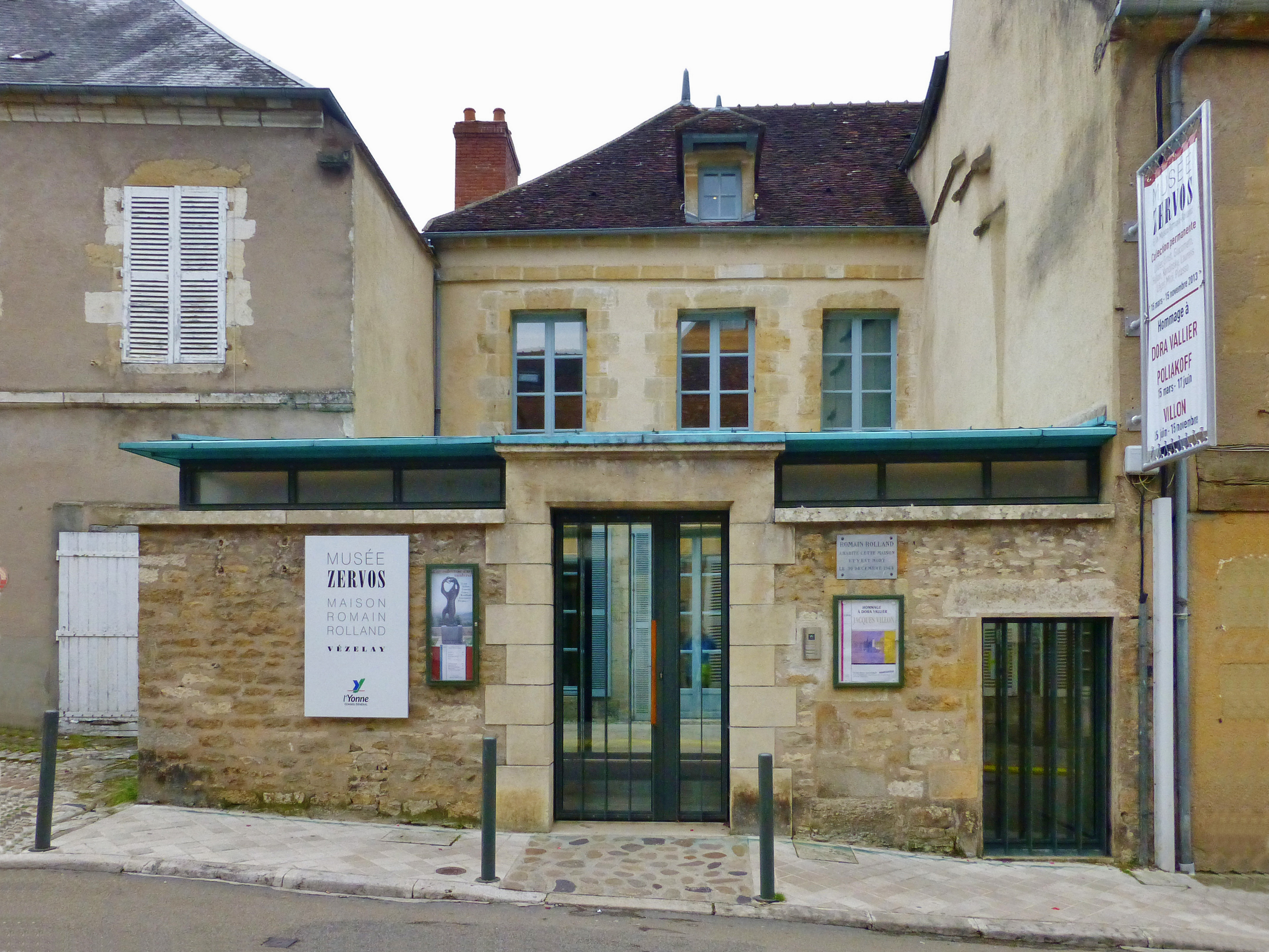 Vézelay : Musée Zervos. Romain Rolland habita dans cette maison et y mourut le 30 décembre 1944